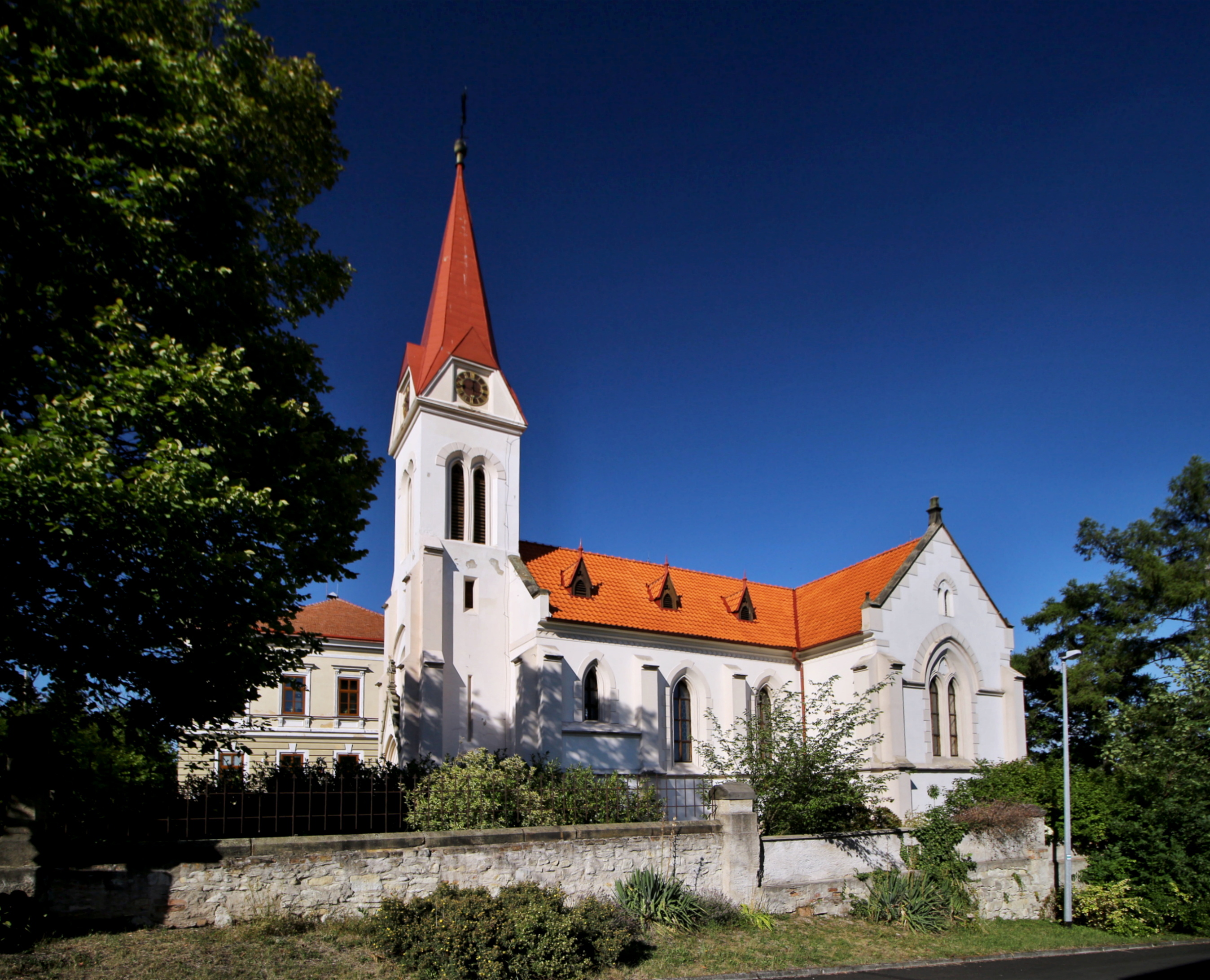 Kostel Narození Panny Marie v Horním Ročově